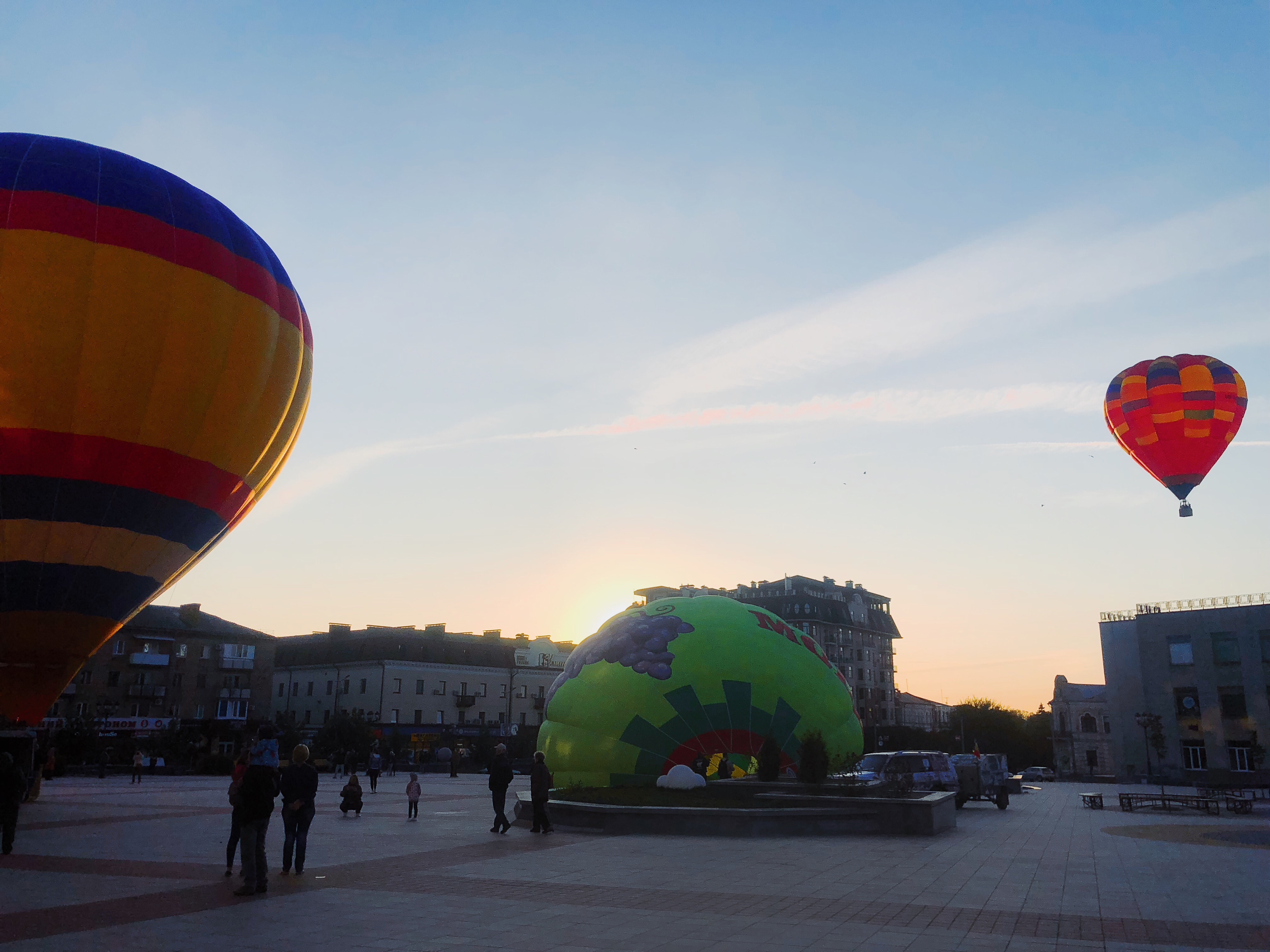 Аеростати готуються до польоту під час встановлення рекорду України